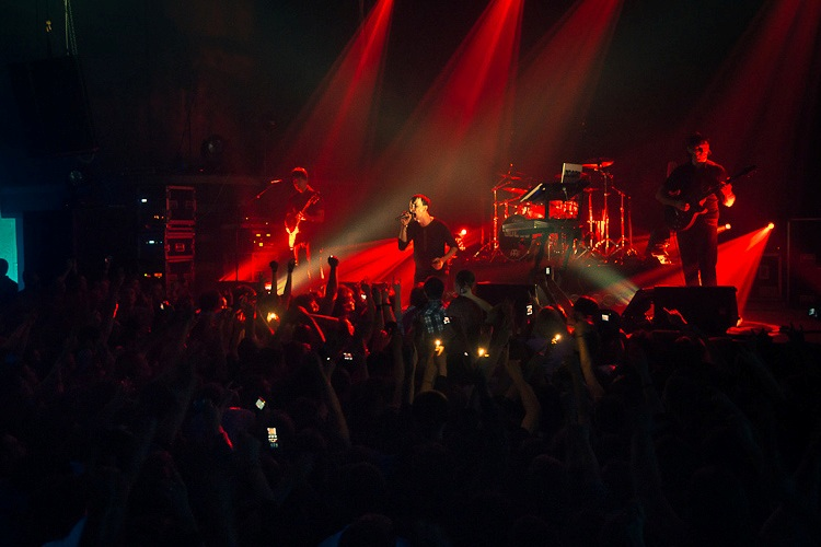 Концерт группы Lumen в Минске 4 декабря 2011